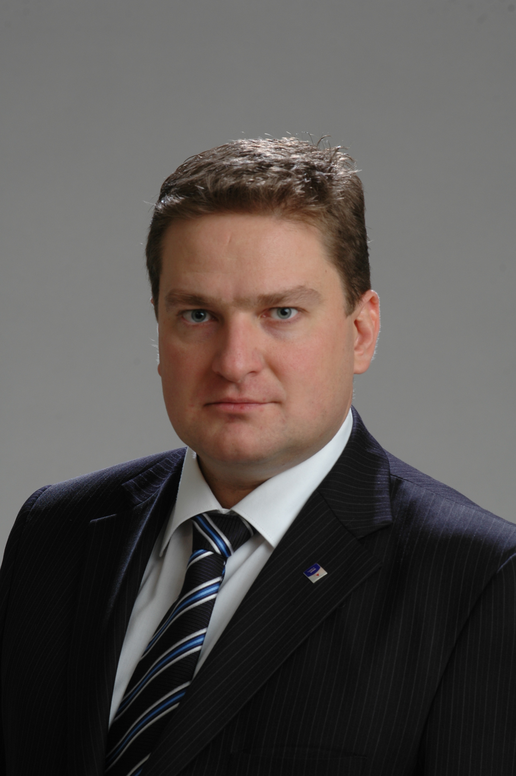 Foto: Saeima